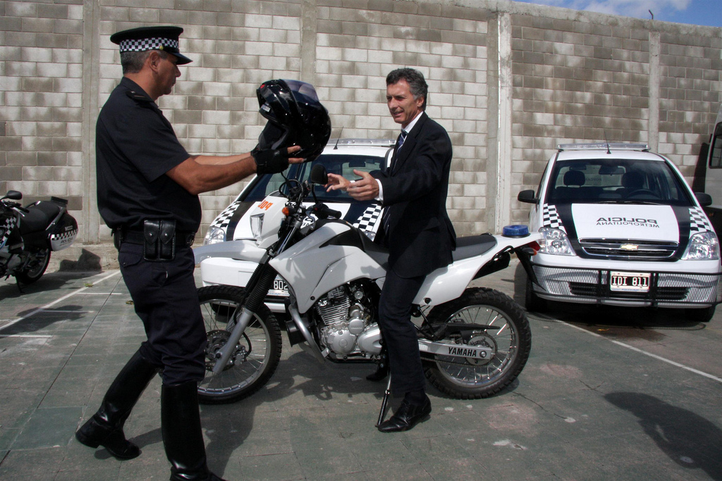 El Jefe de Gobierno de la Ciudad de Buenos Aires., Mauricio Macri, supervisó el trabajo de la Policía Metropolitana en el Barrio de Saavedra.